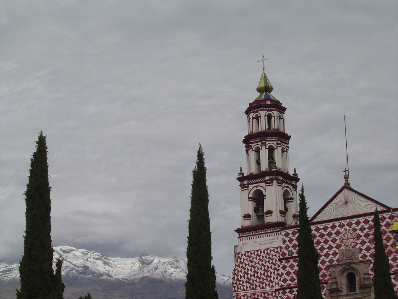 Iglesia de Amecameca